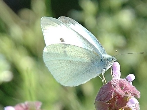 Small White (モンシロチョウ)